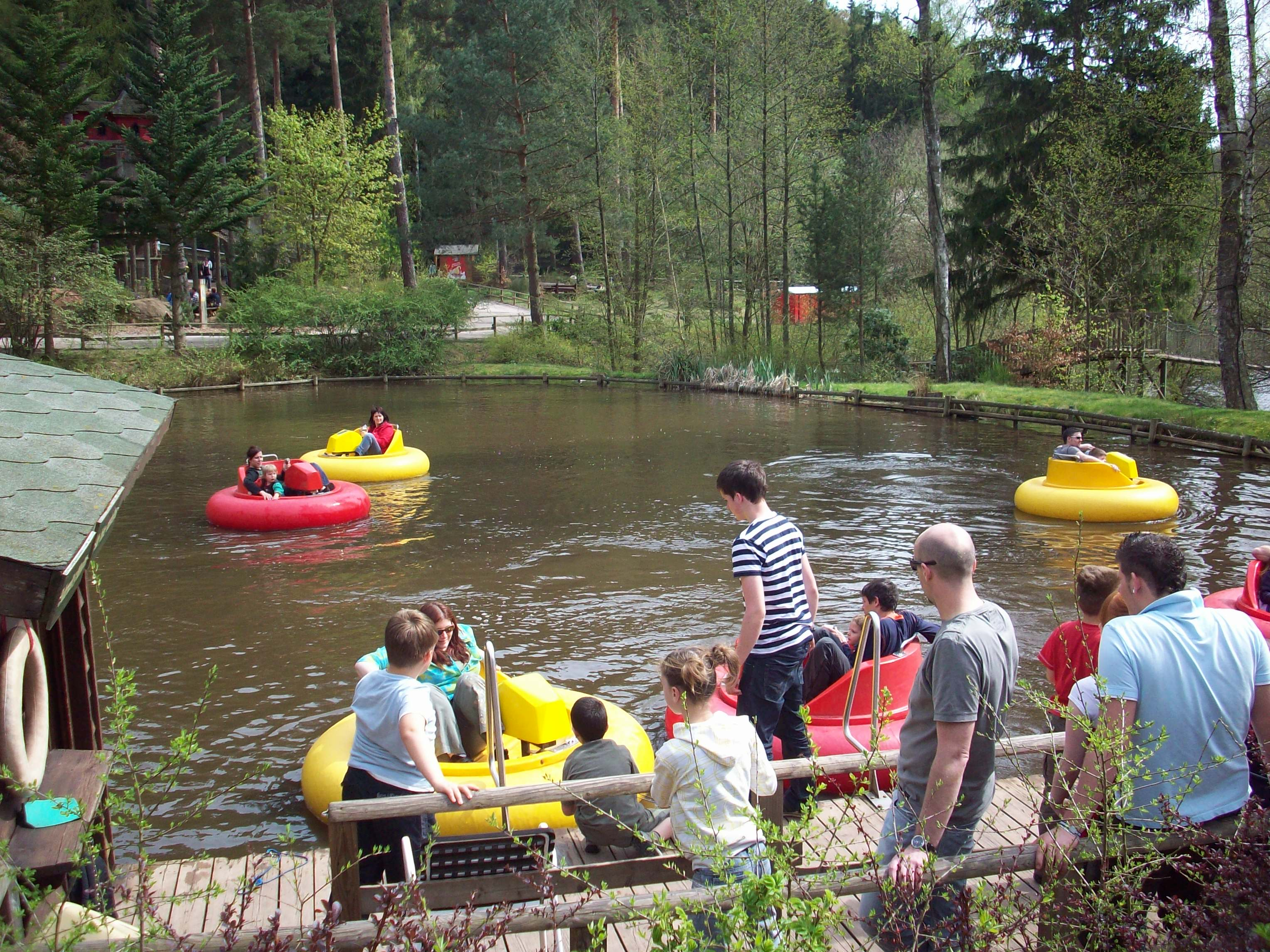 Zeigt die "Bumperboats" des Kurpfalz-Parks wachenheim